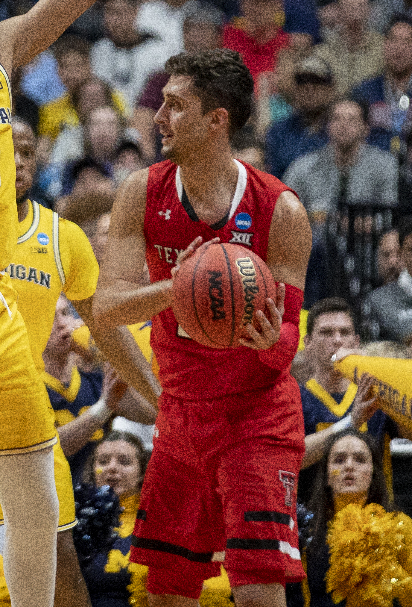 _O6A3193